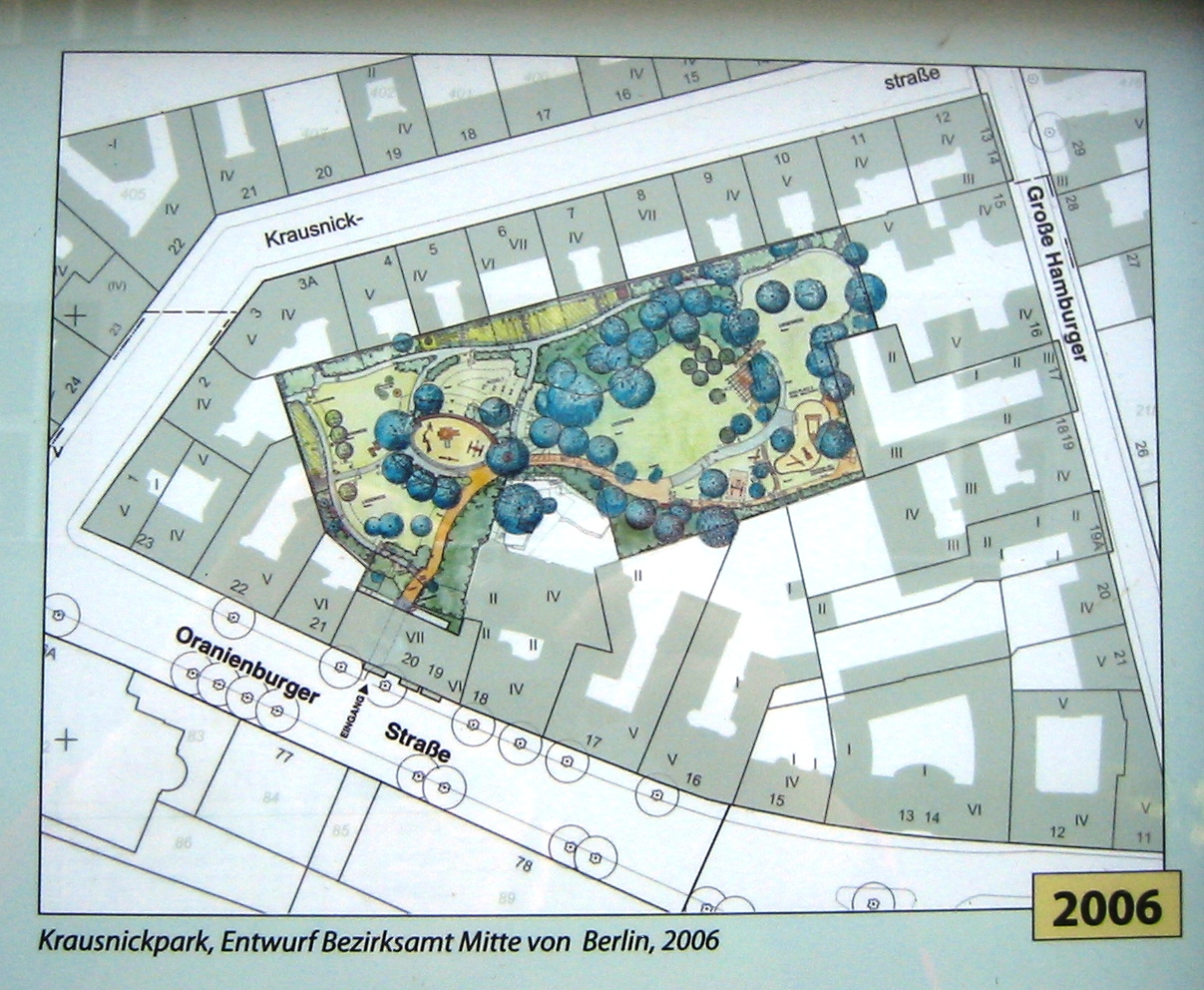 Entwurfszeichnung des Krausnickspark in Berlin-Mitte